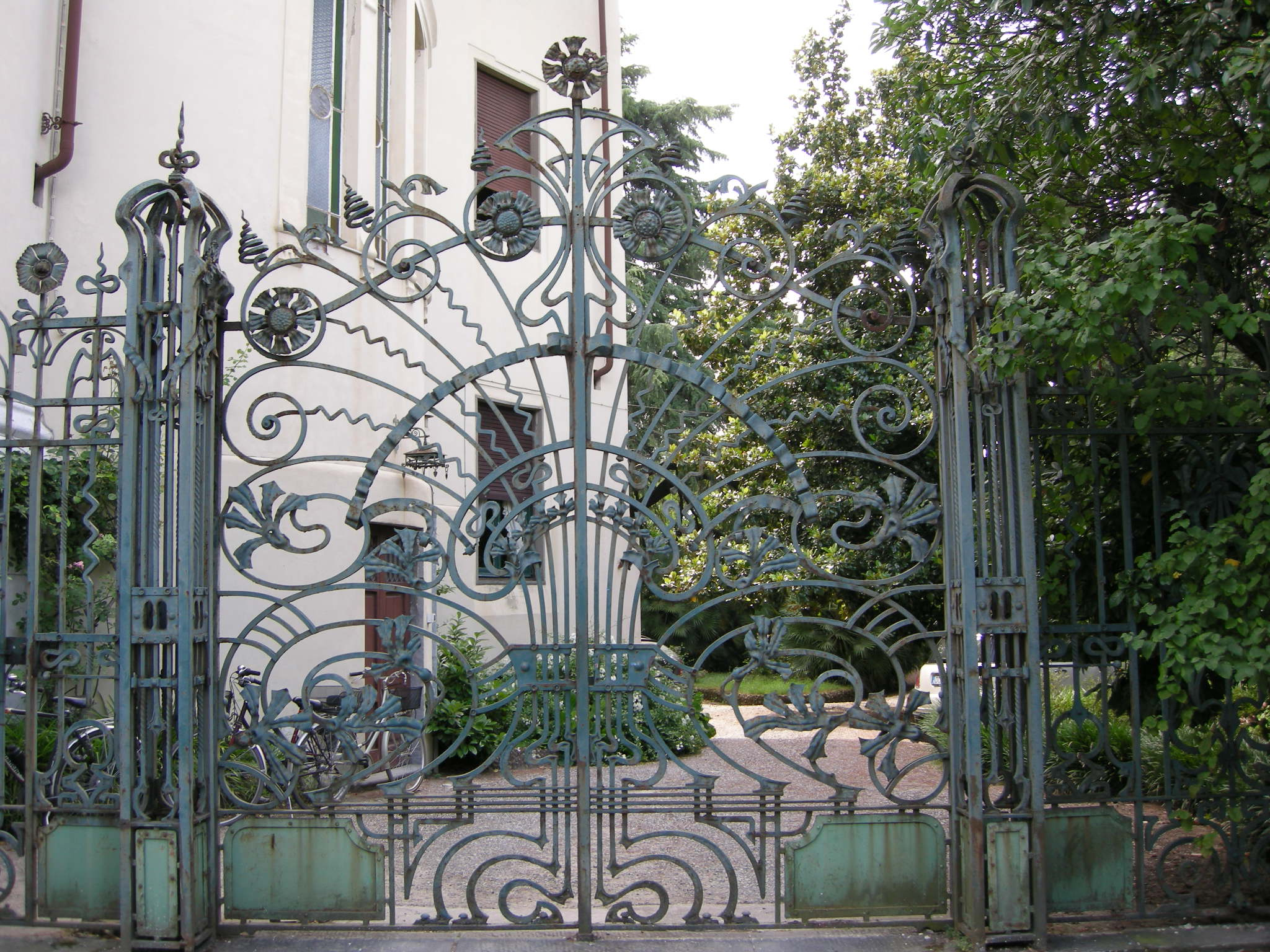 Villa Simonetti or Villa Simonini. Lucca, Tuscany.